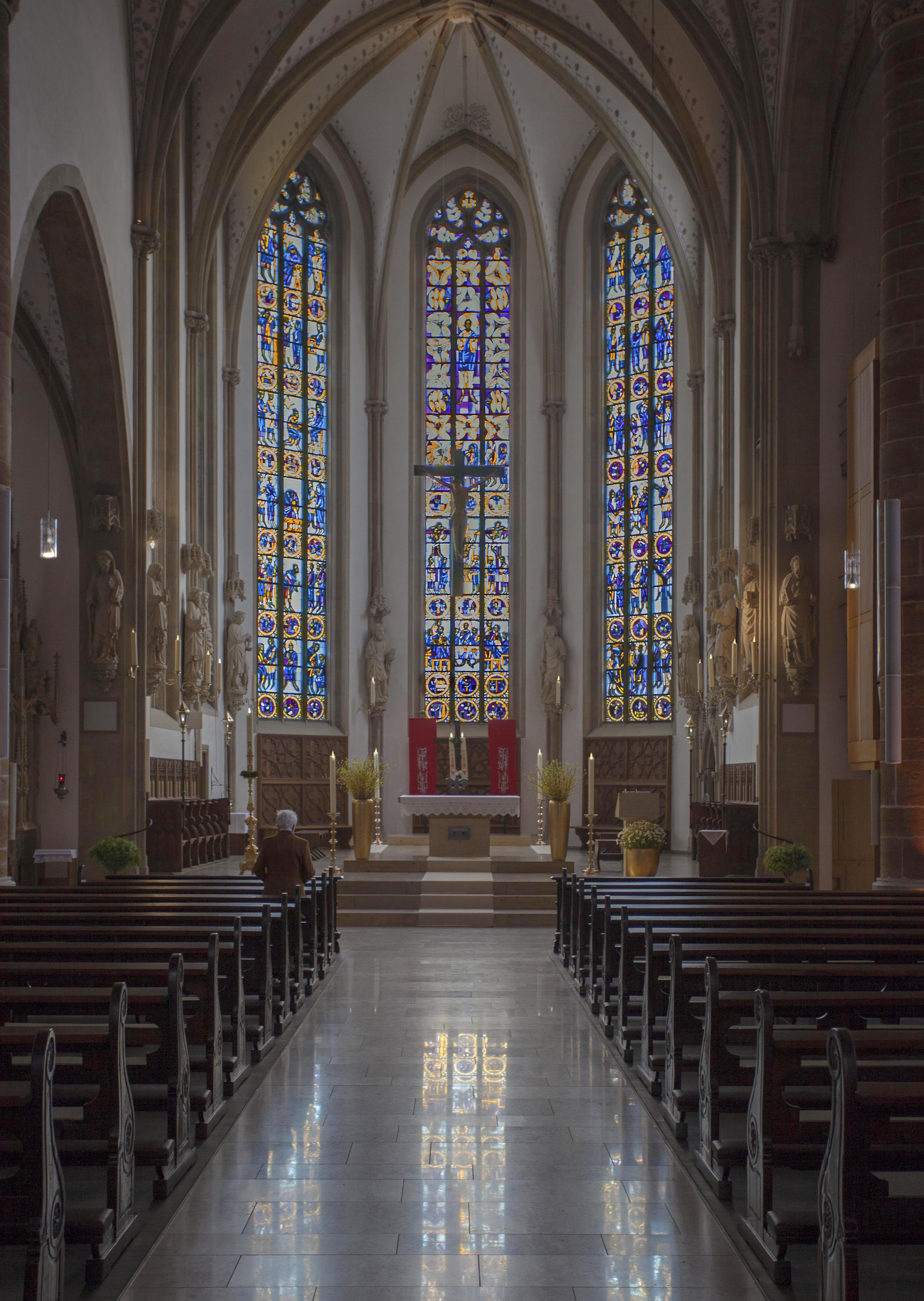 St. Dionysius Rheine - Chor-2